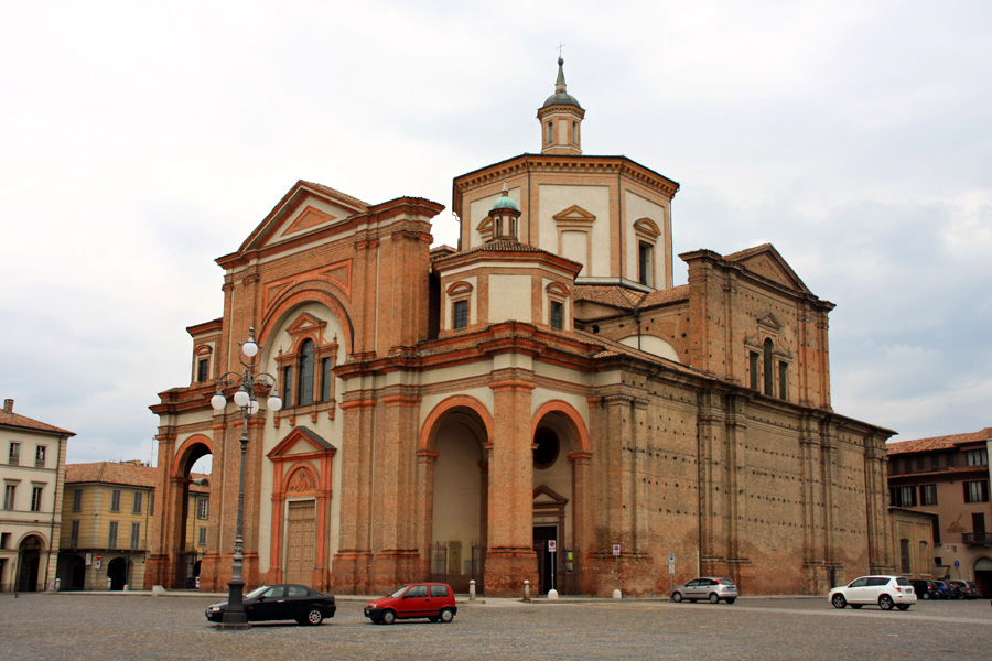 Veduta del Duomo di Voghera (PV)